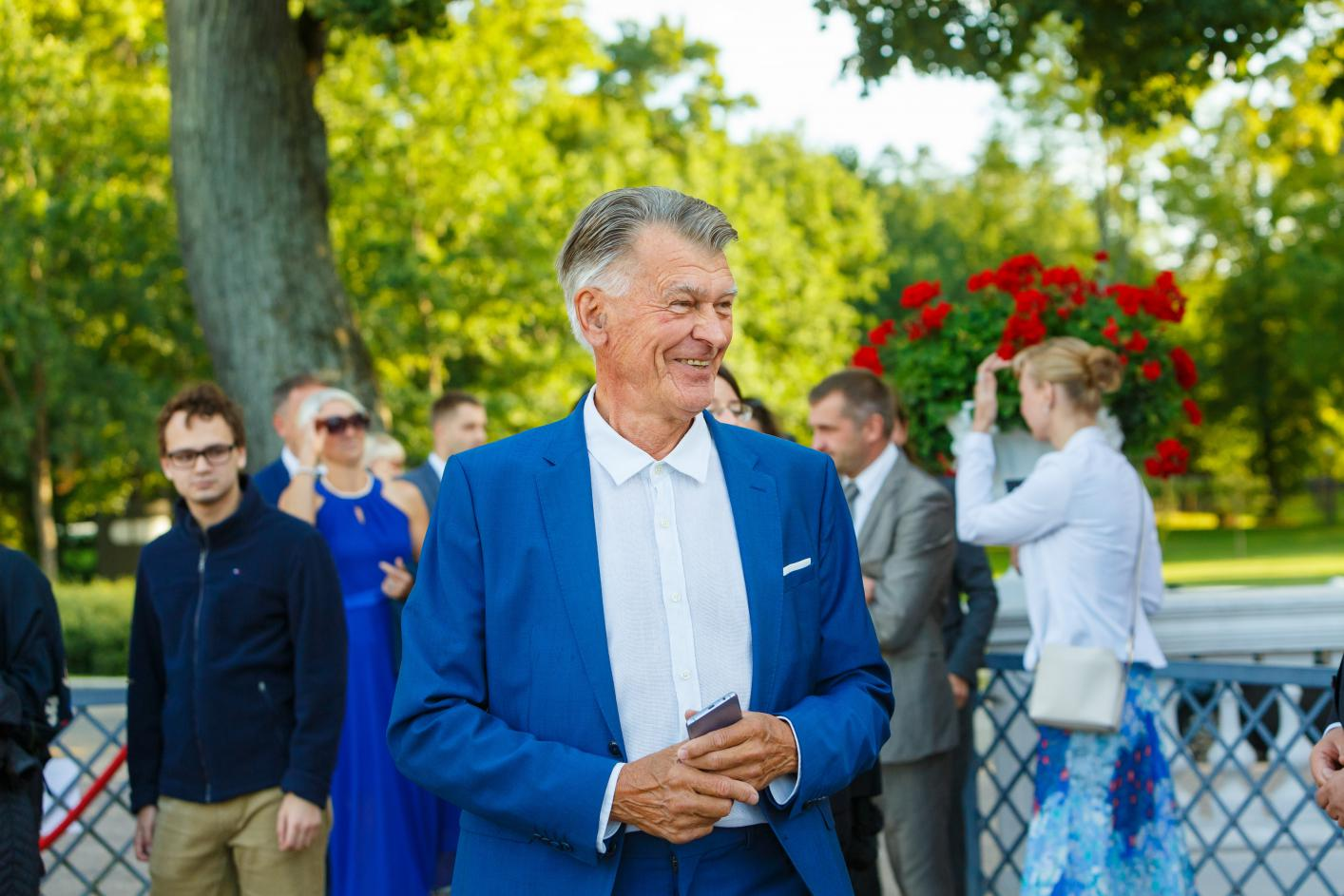 Jaan Manitski. Välisministeeriumi 100. sünnipäev Kadrioru Lilleaias